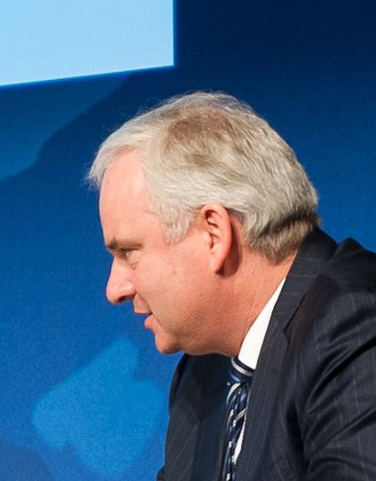 Johannes Teyssen à la Foire de Hanovre en 2011.